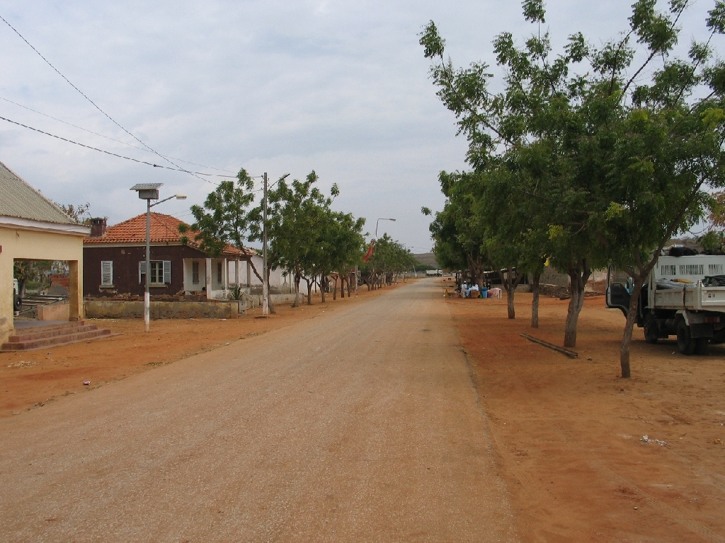 Straße in Barra do Dande, Angola